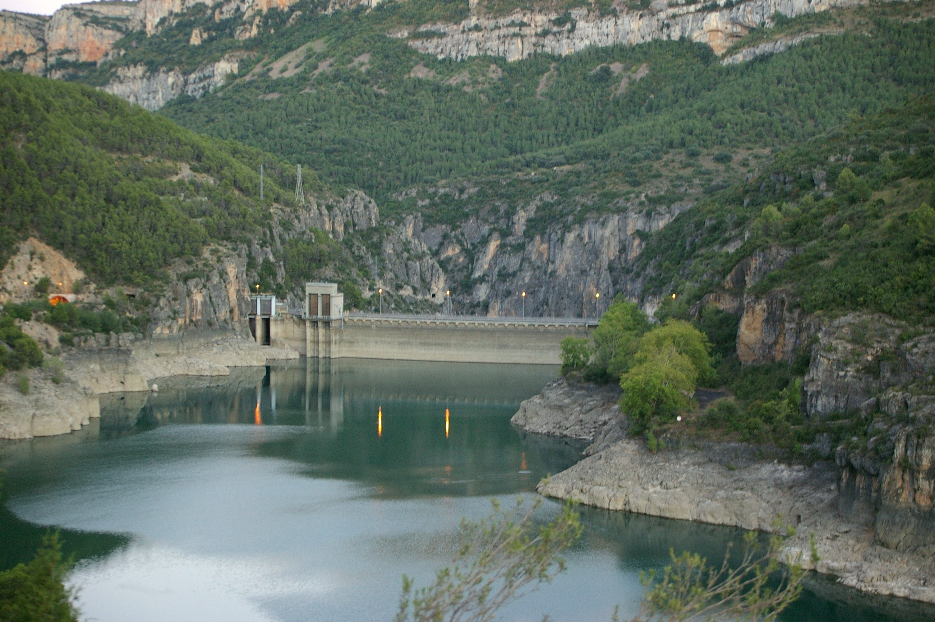 Río Noguera Pallaresa a su paso por el pantano de Camarasa. Vista trasera de la presa (Lérida, España)